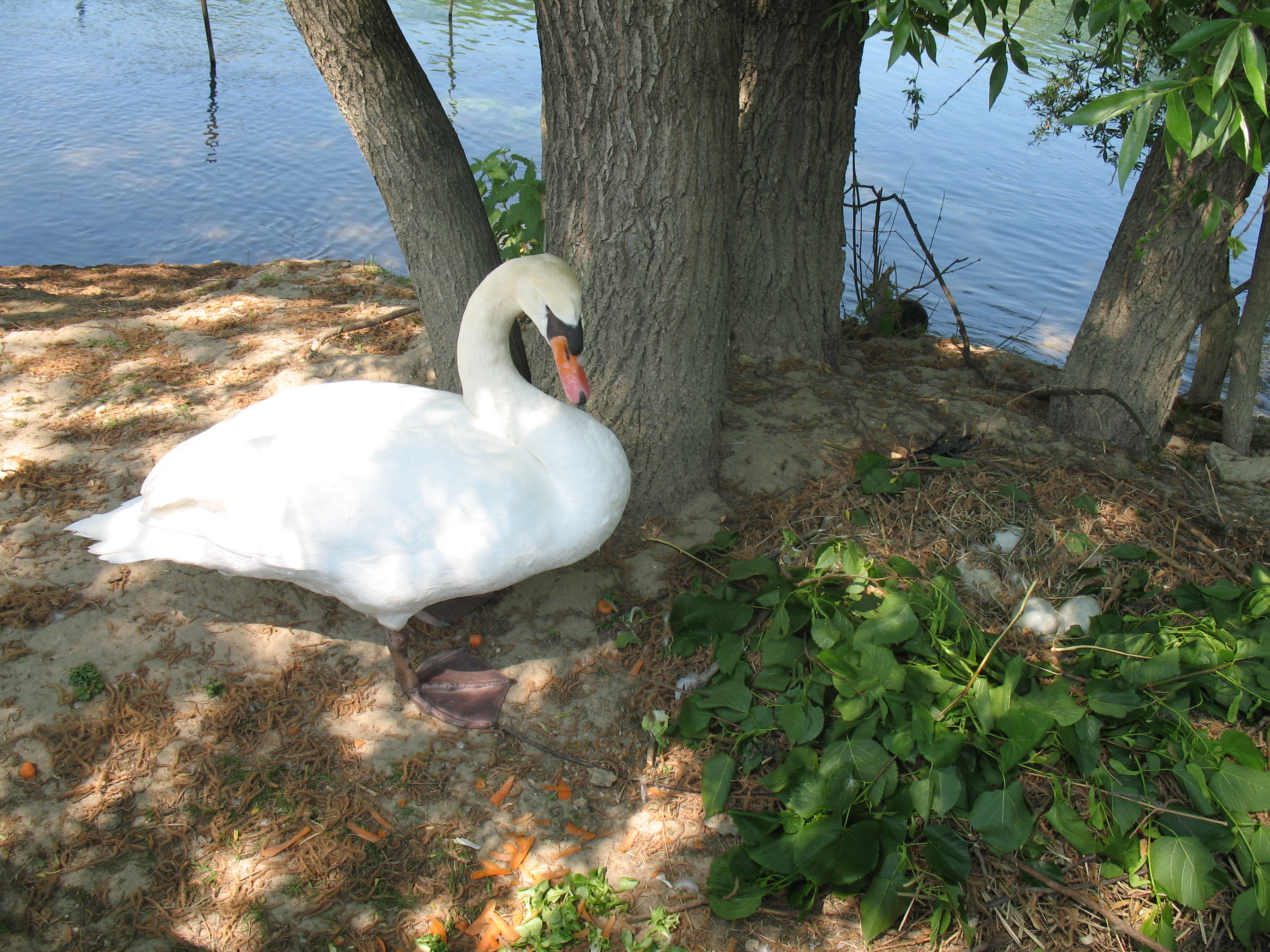 Cygne s'occupant de son nid avec ses oeufs. Photo prise en bord de Marne à Noisy le grand (93) France